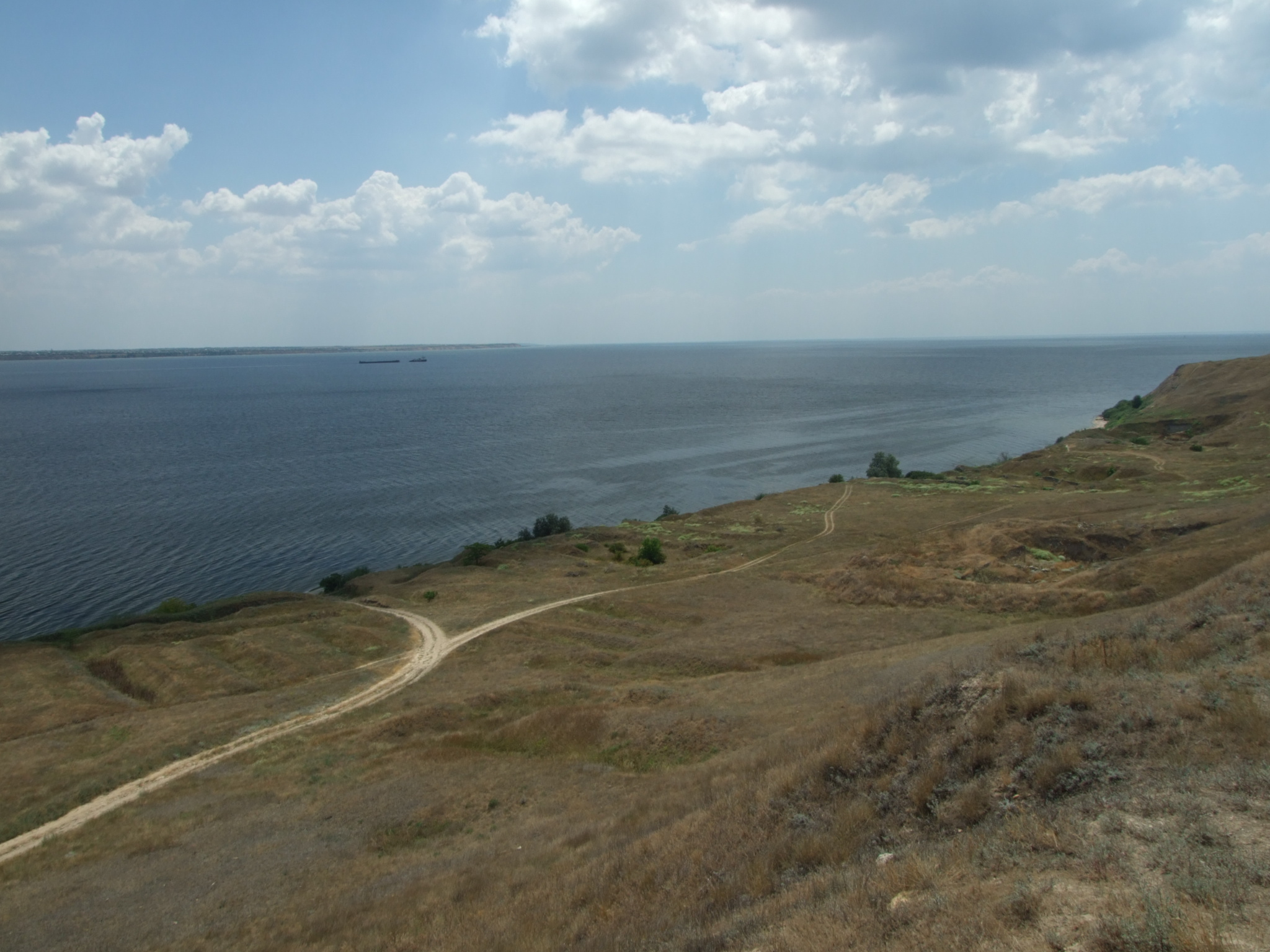 Стародавнє місто Ольвія